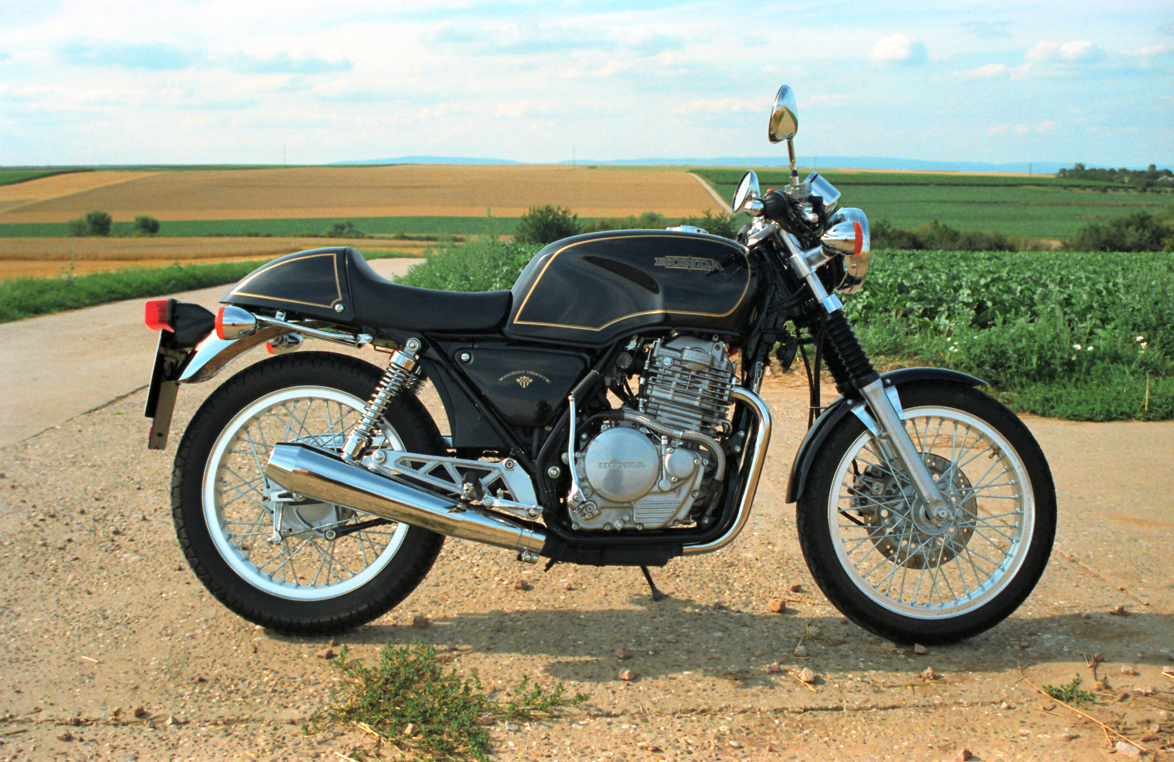 Honda GB500 Clubman